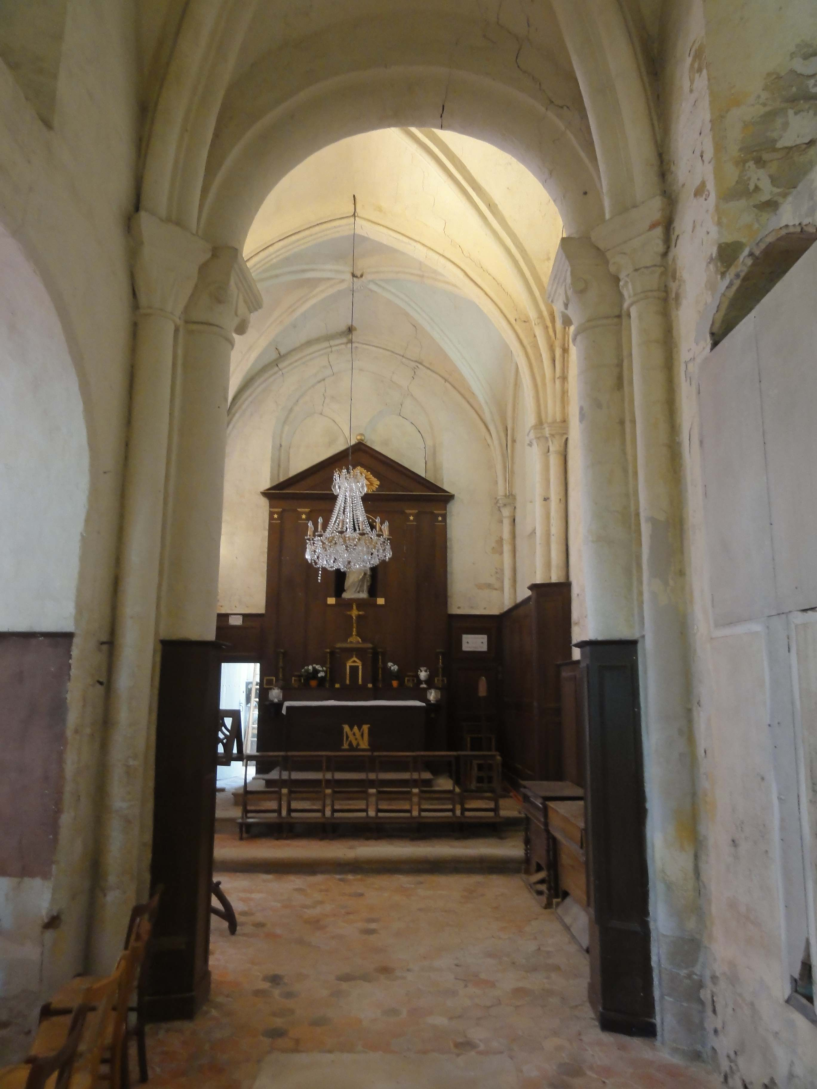 Intérieur de l'église - voir titre.